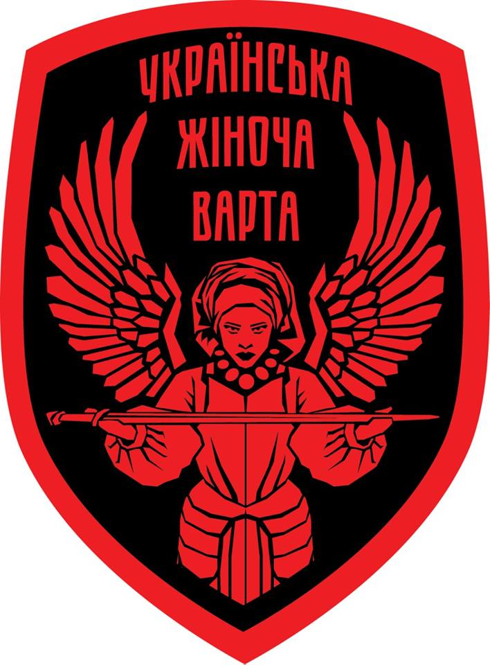 Автор Андрій Єрмоленко – український художник, ілюстратор та дизайнер. Шеврон є власністю УЖВ.